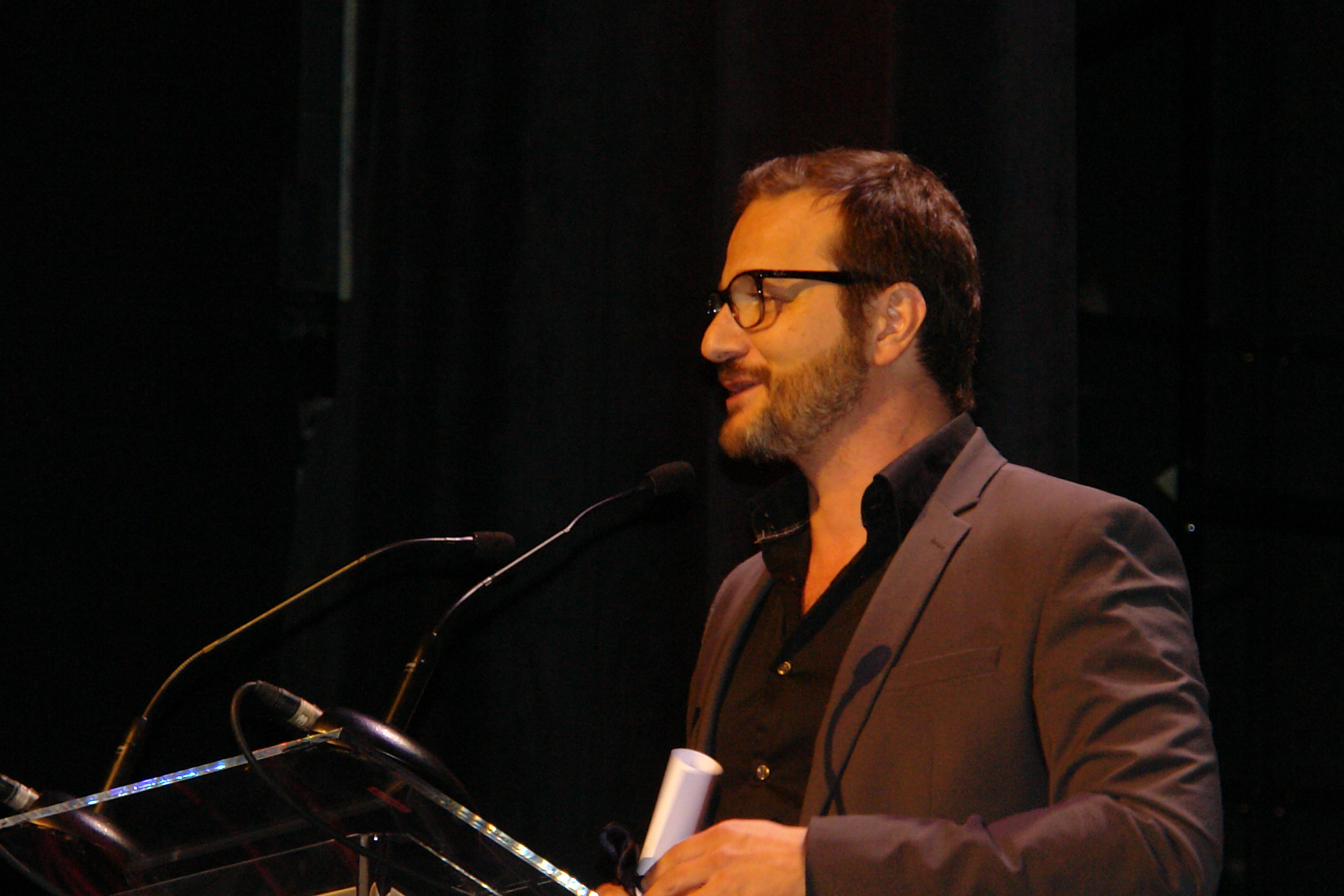 PATRICK RIDREMONT 2012 - Festival international du film francophone de Namur